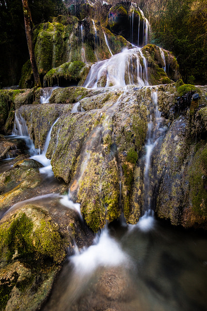 A Roquefort les Cascades, Ariège, France.